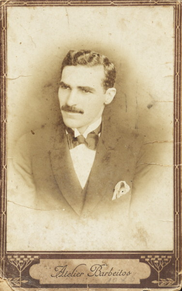 Foto de Fábio Alves Leitão